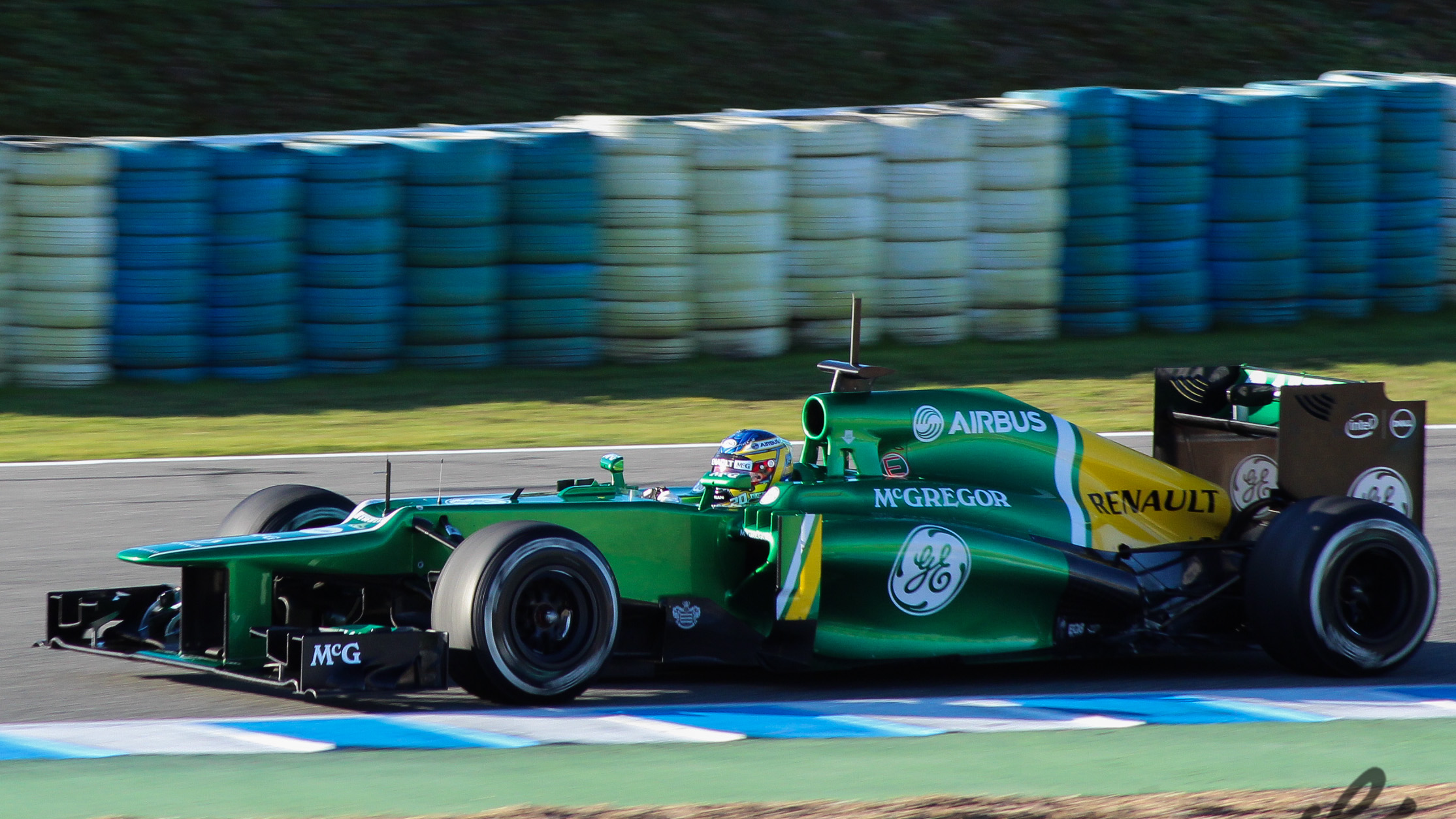 Fotos hechas el 7 de Febrero de 2013 en el circuito de Jerez, plena pre-temporada de F1. Would you like to follow me on Instagram and Twitter?